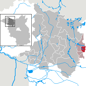 Vielitzsee in Brandenburg (Country) - District Ostprignitz-Ruppin